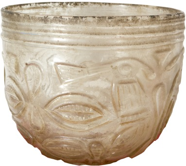 Vas Hispano-Àrab